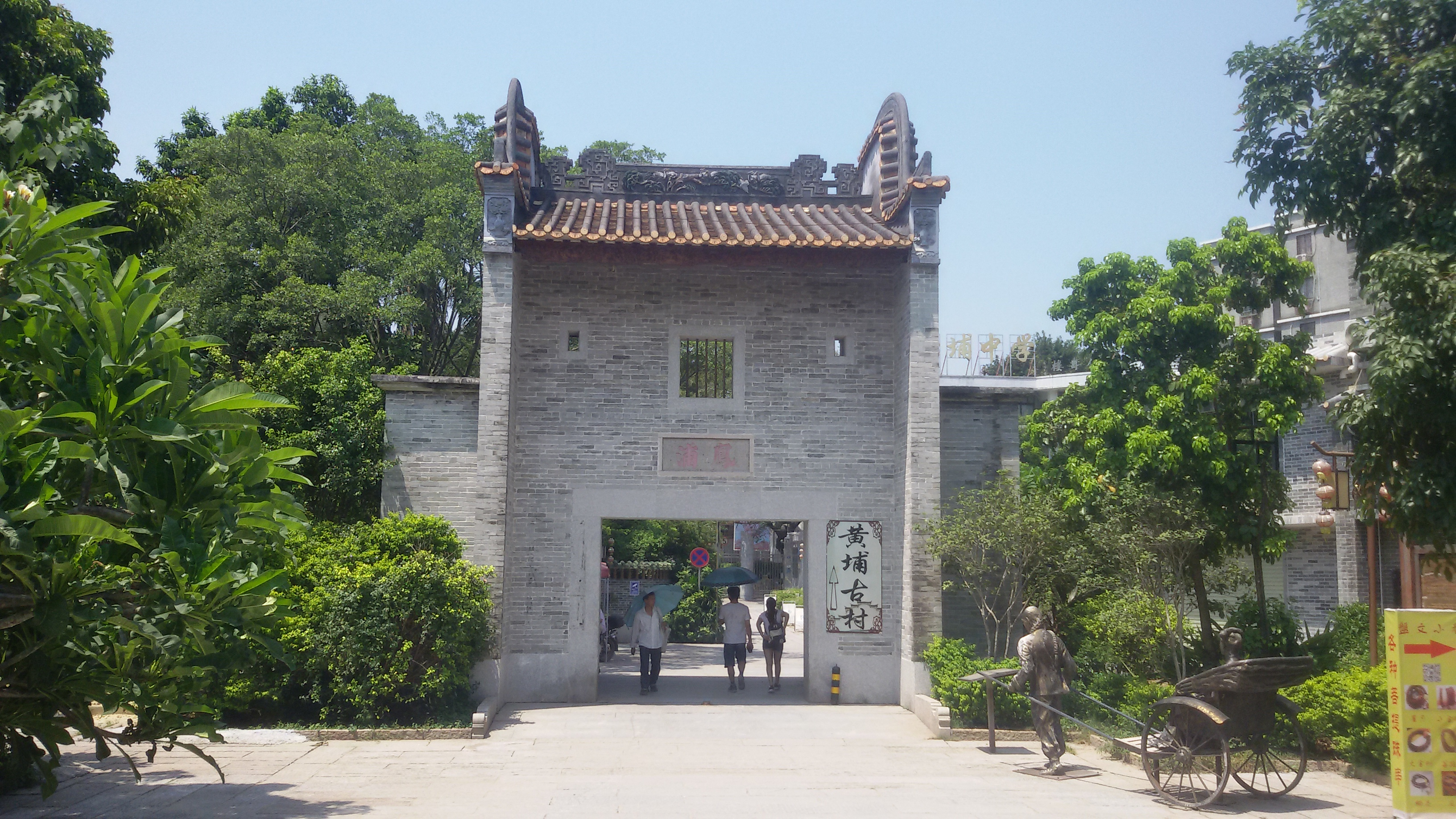 粵語: 黃埔古村嘅南牌坊